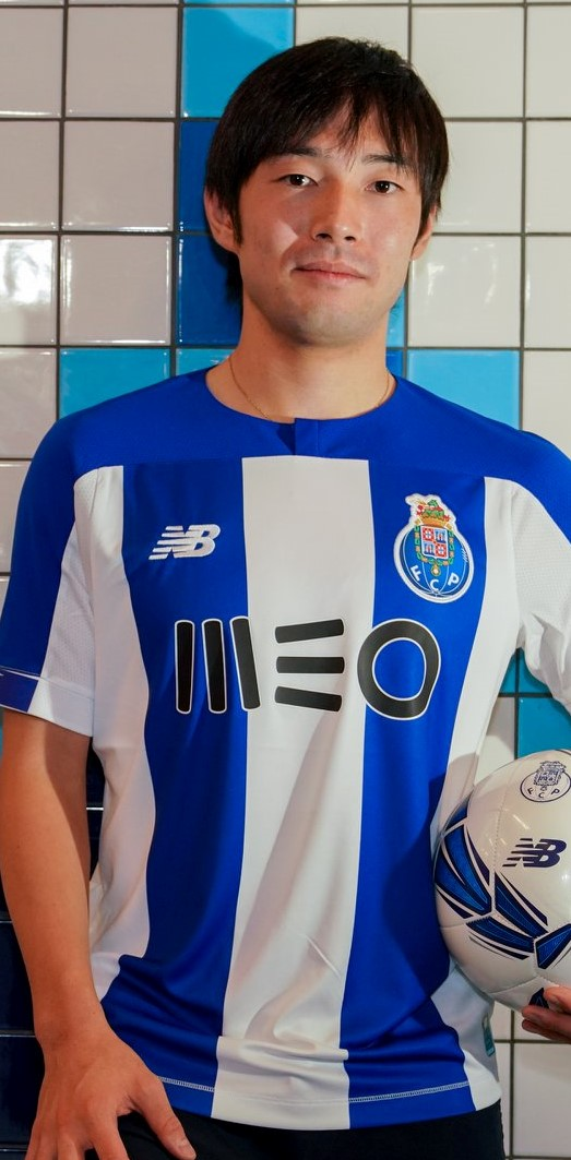 Shōya Nakajima, Player of FC Porto.